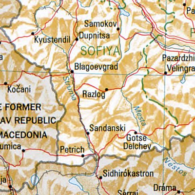 Raslog - Lage des Ortes in Bulgarien